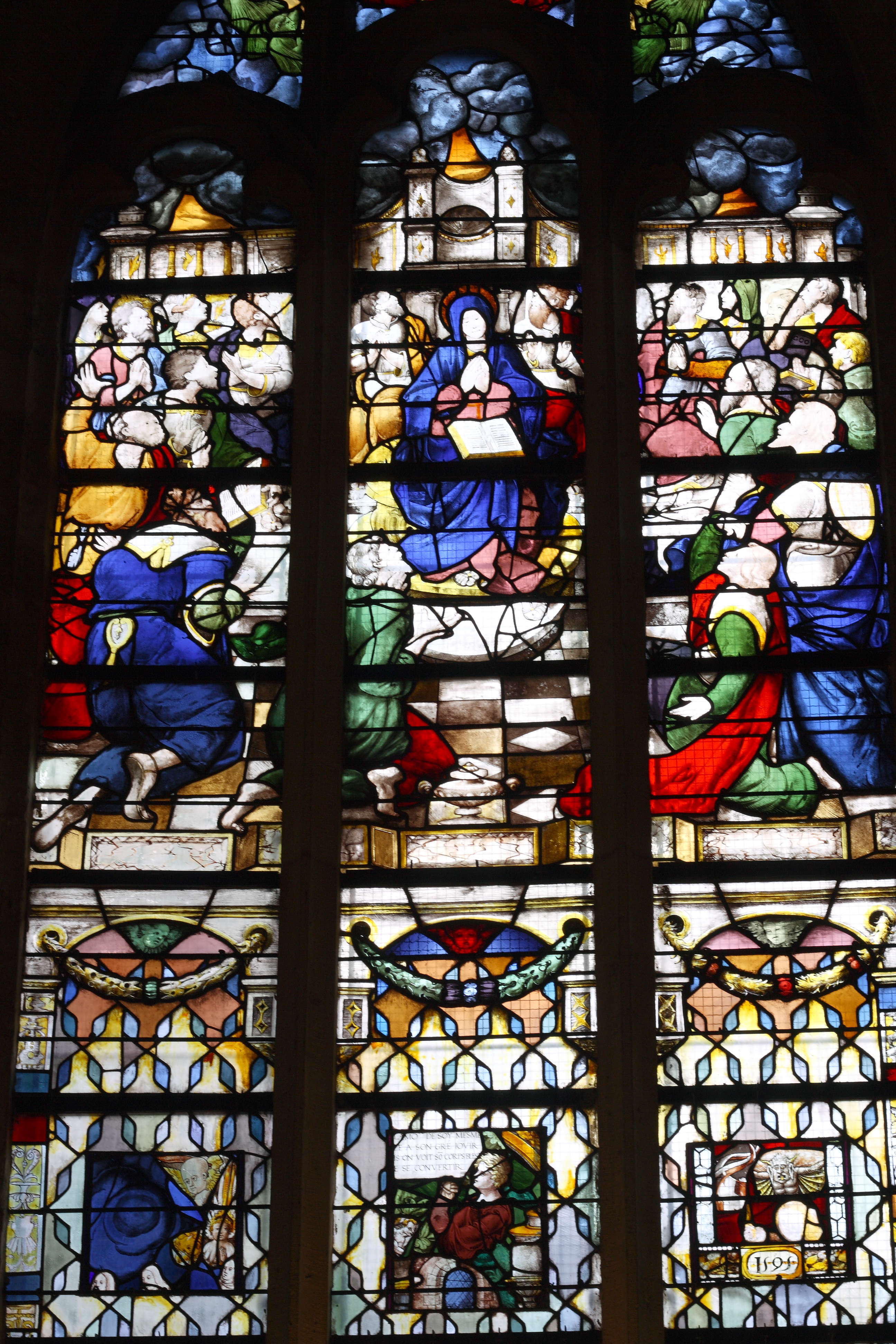 Bleiglasfenster in der katholischen Kirche Notre-Dame-de-Pitié in Puteaux